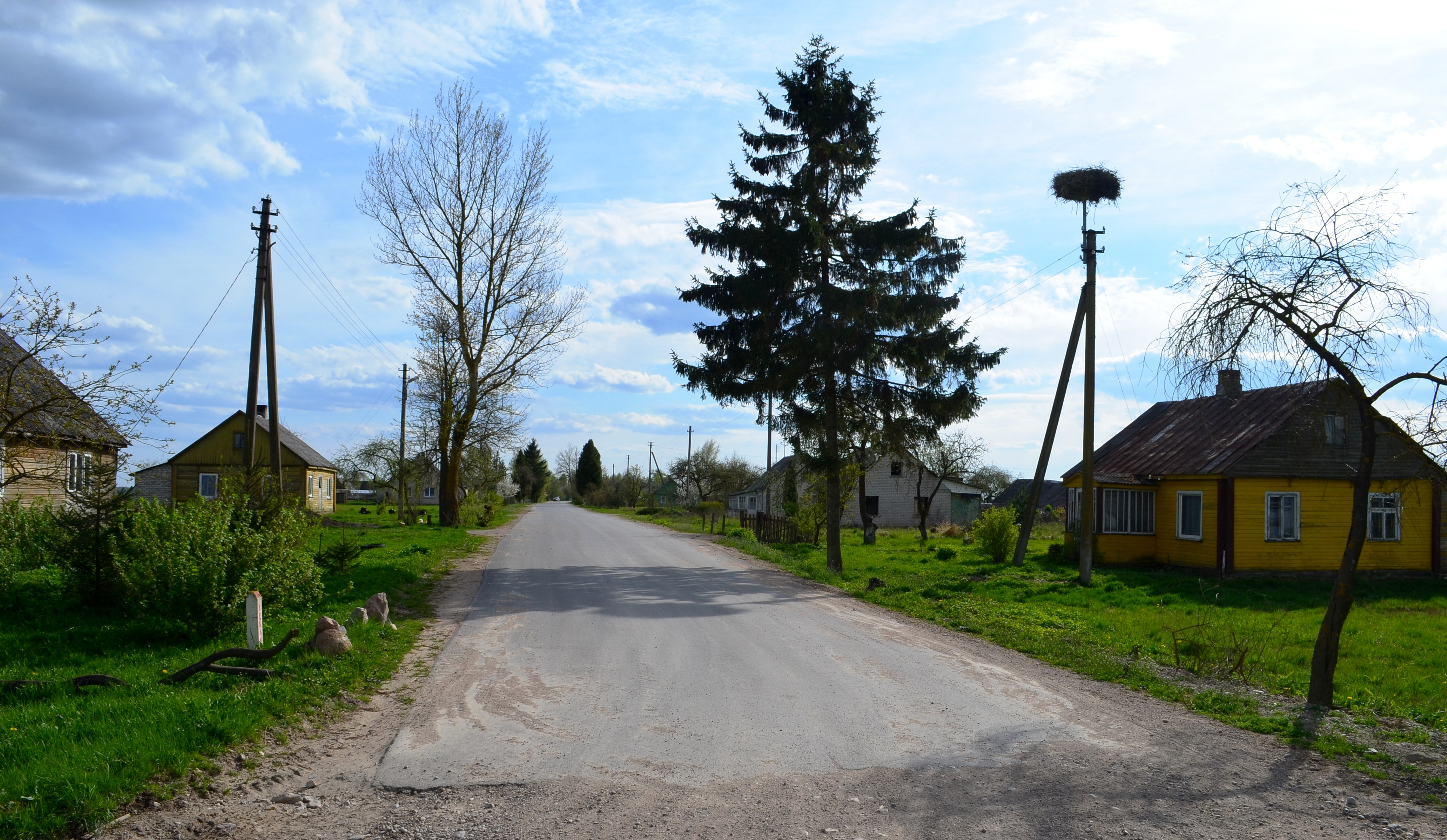 Paežerių k., Kėdainių raj.